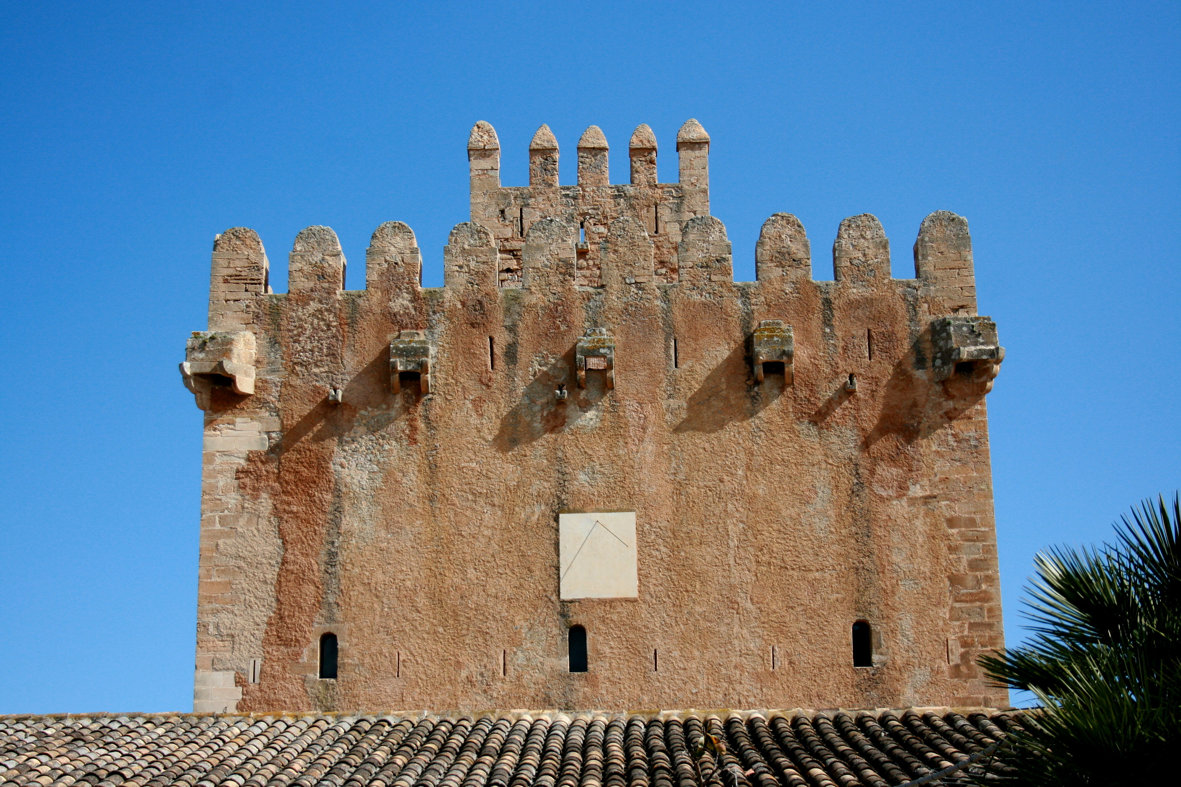 Torre de Canyamel in Capdepera, Mallorca